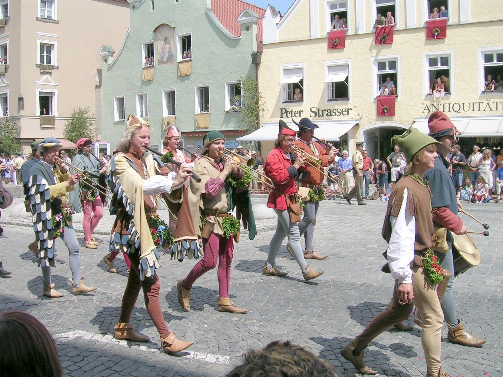 Landshuter Hochzeit, 2005